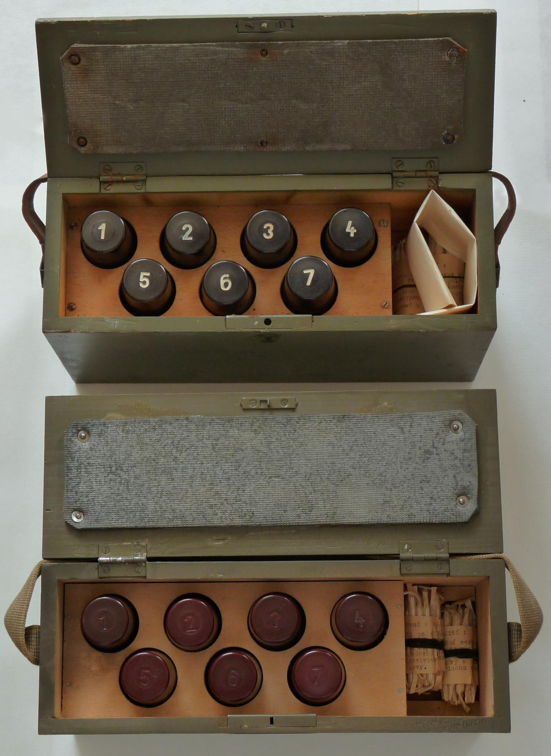 Vzorkovnice BCHL II vnitřek